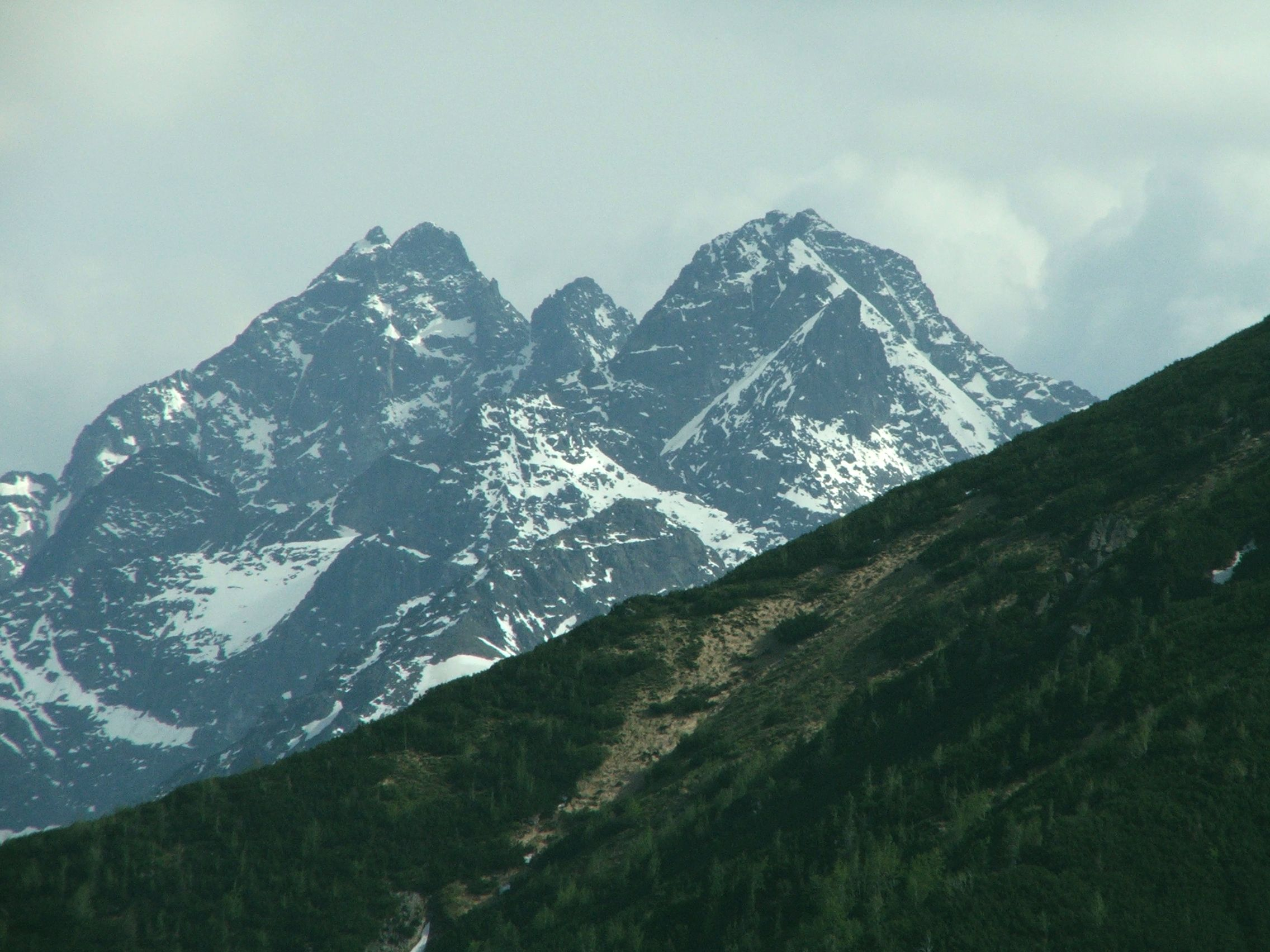 Widok z Gęsiej Szyi na Tatry Wysokie. Od lewej: szczyt Wysokiej z dwoma wierzchołkami, w środku niższy Ciężki Szczyt, po prawej stronie Rysy. Z boku na pierwszym planie stok Wołoszyna.